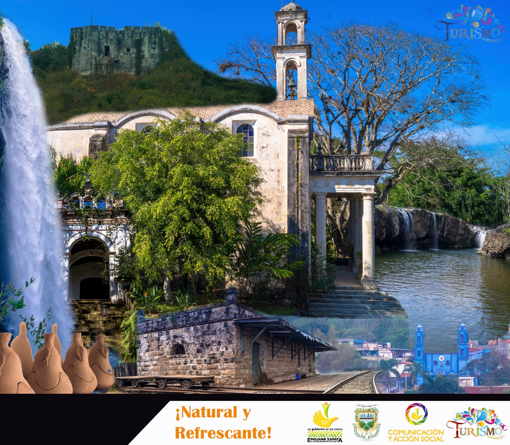 Turismo Emiliano Zapata